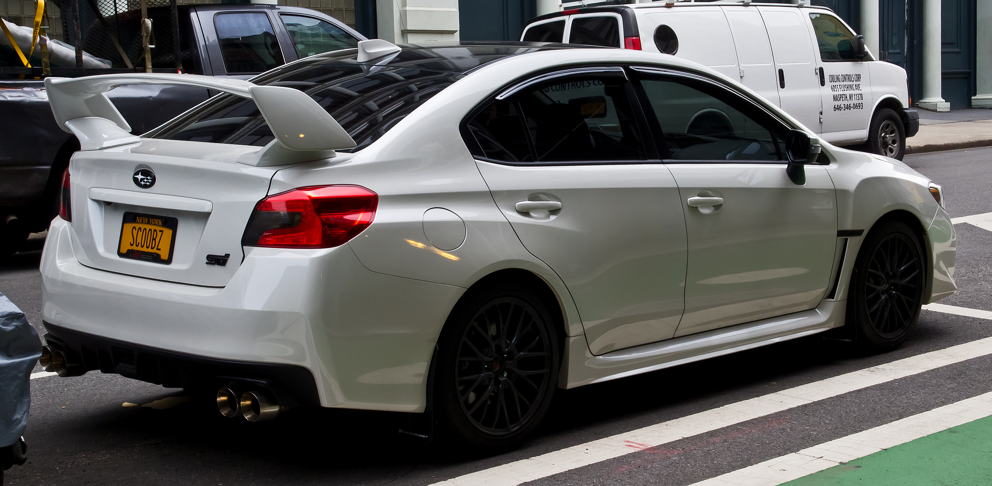 Subaru WRX STI (IV)